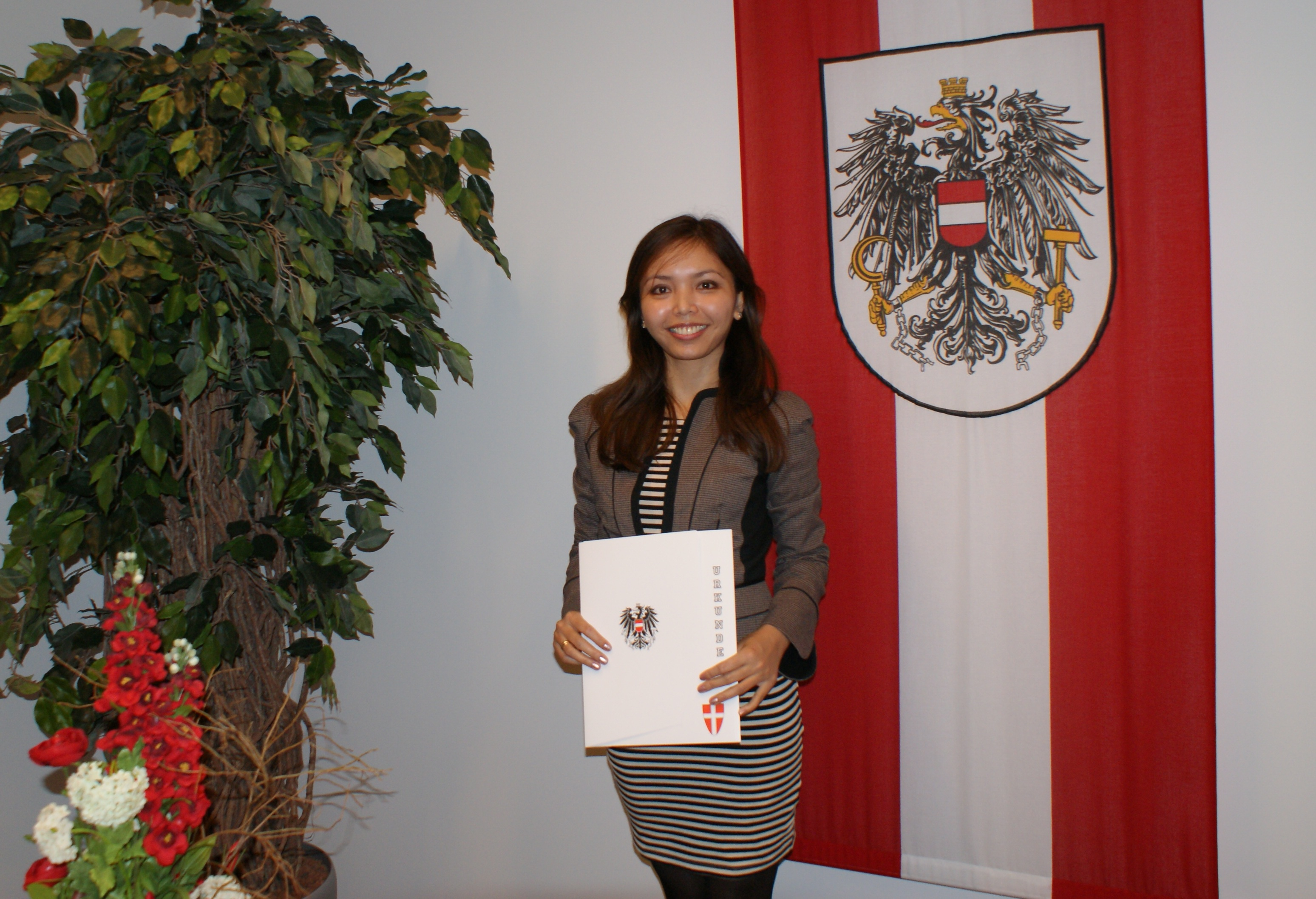 Verleihung der Staatsbürgerschaft im Gelöbniszimmer, Wien